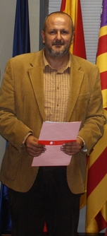 Miquel Ensenyat, batle d'Esporles i militant del PSM